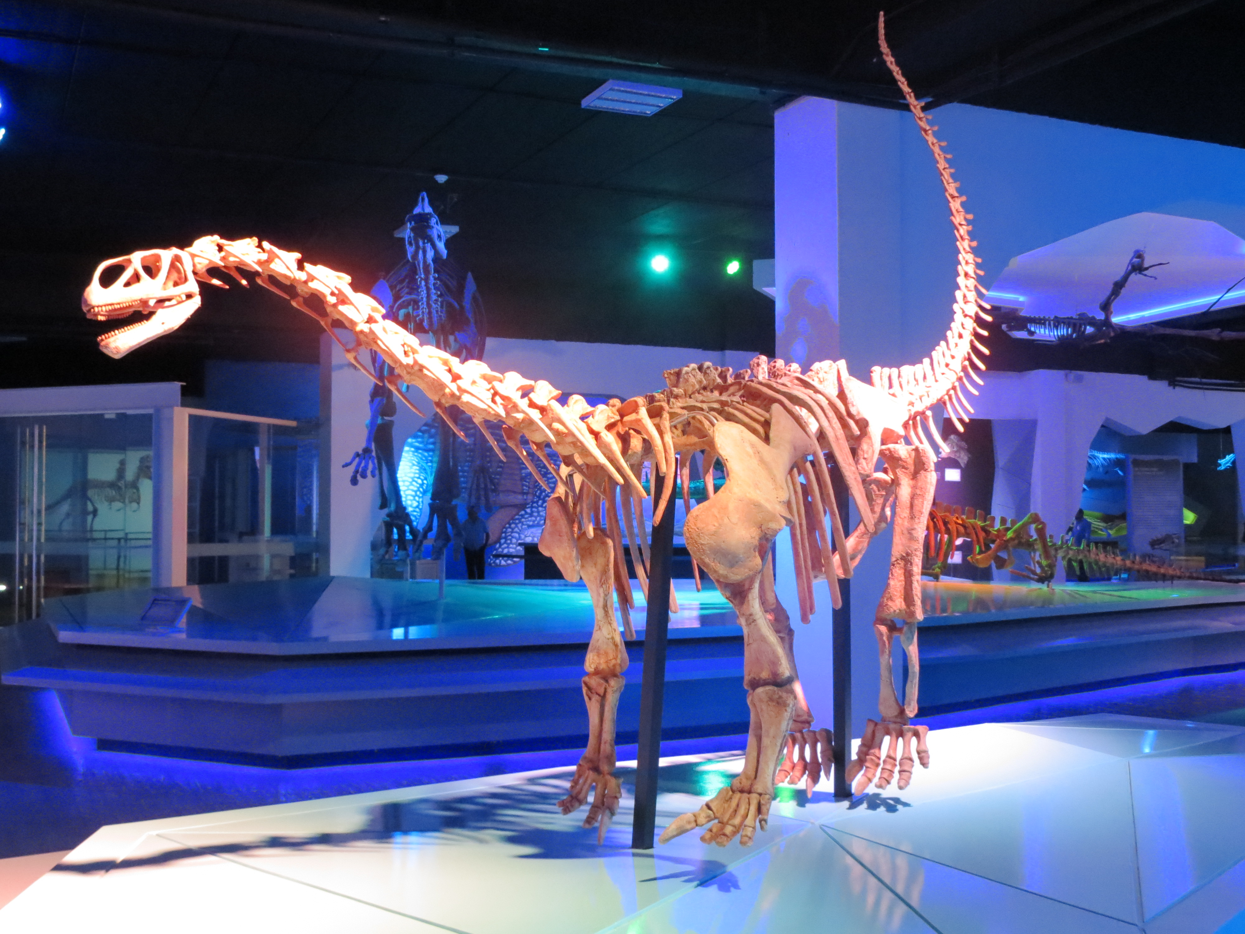 Esqueleto de Bellusaurus en el Museo de la Evolución de Puebla